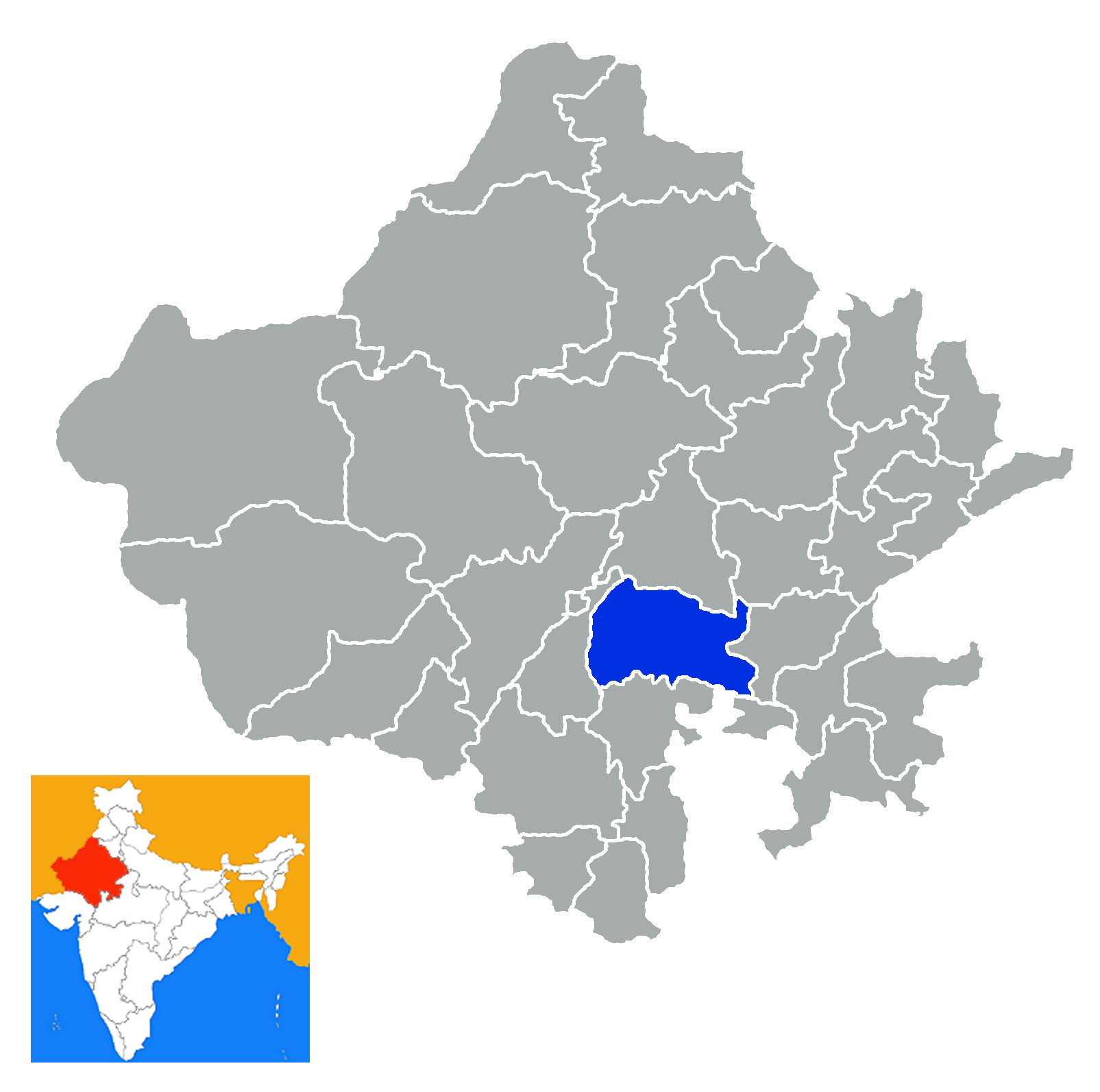 Distrito de Bhilwara Rajastan India